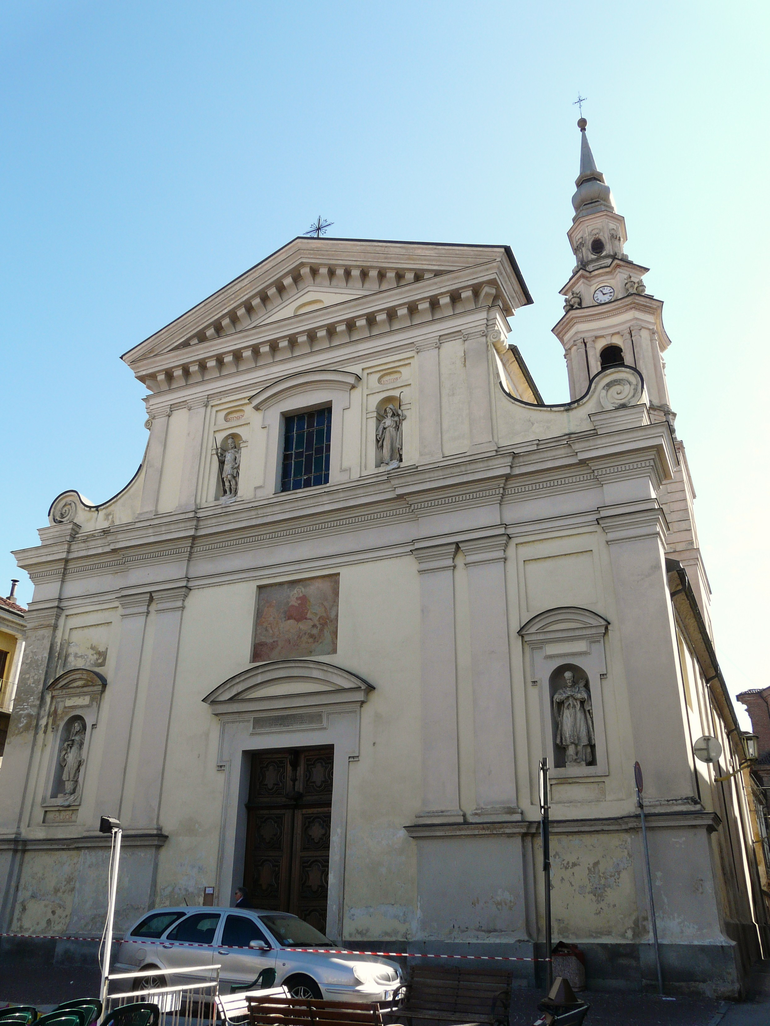 Chiesa della Misericordia, Carignano, Piemonte, Italia